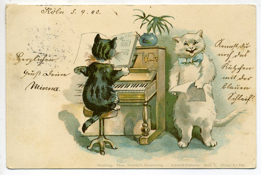 Tiere no 623